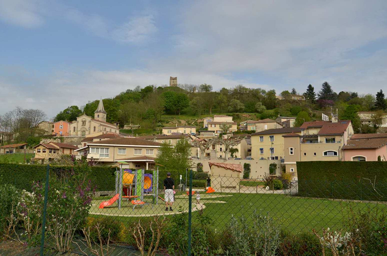 le village de Mercurol